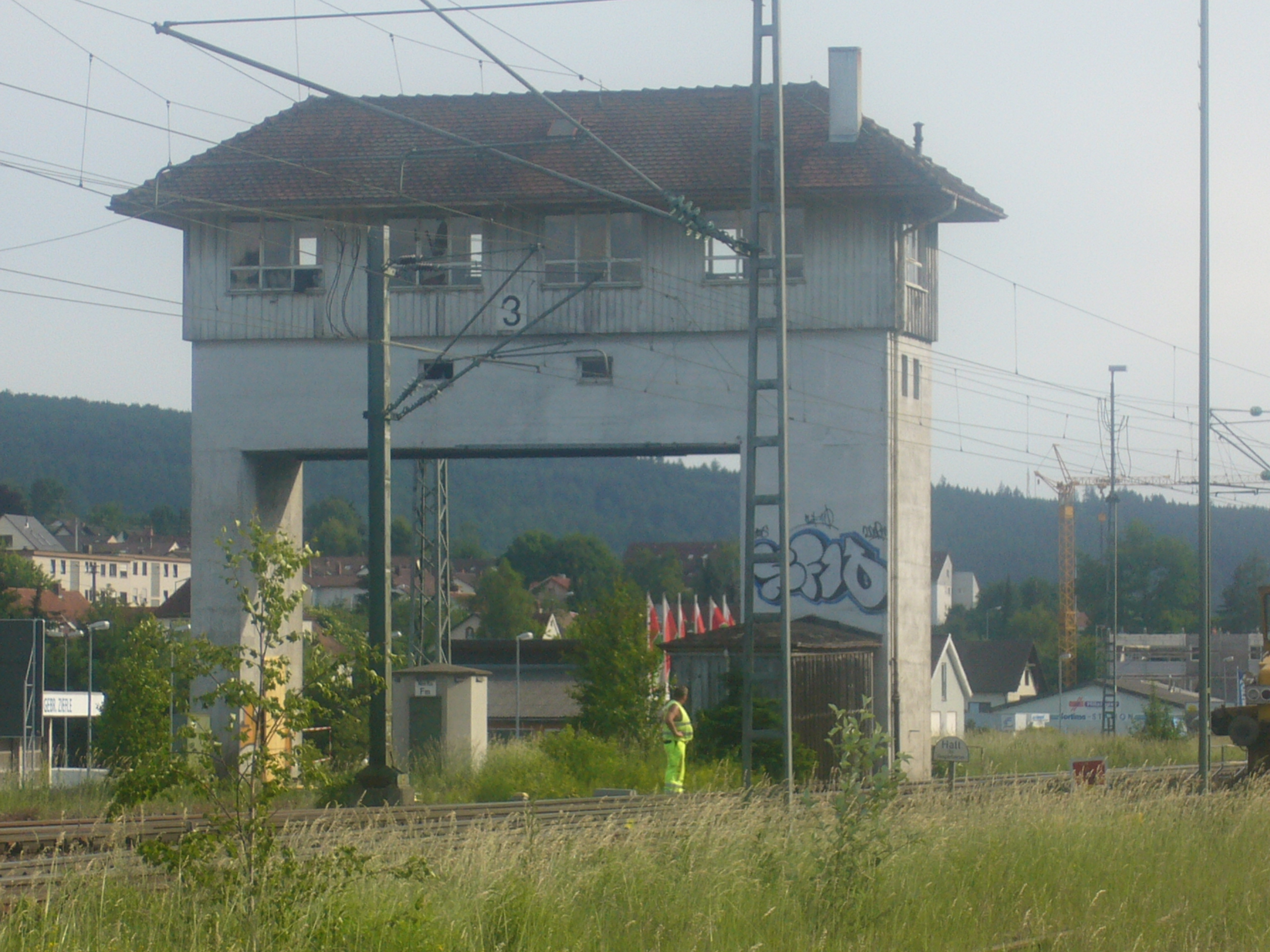 Brückenstellwerk an der Einfahrt zum Bahnbetriebswerk (Bahnhof Tuttlingen)